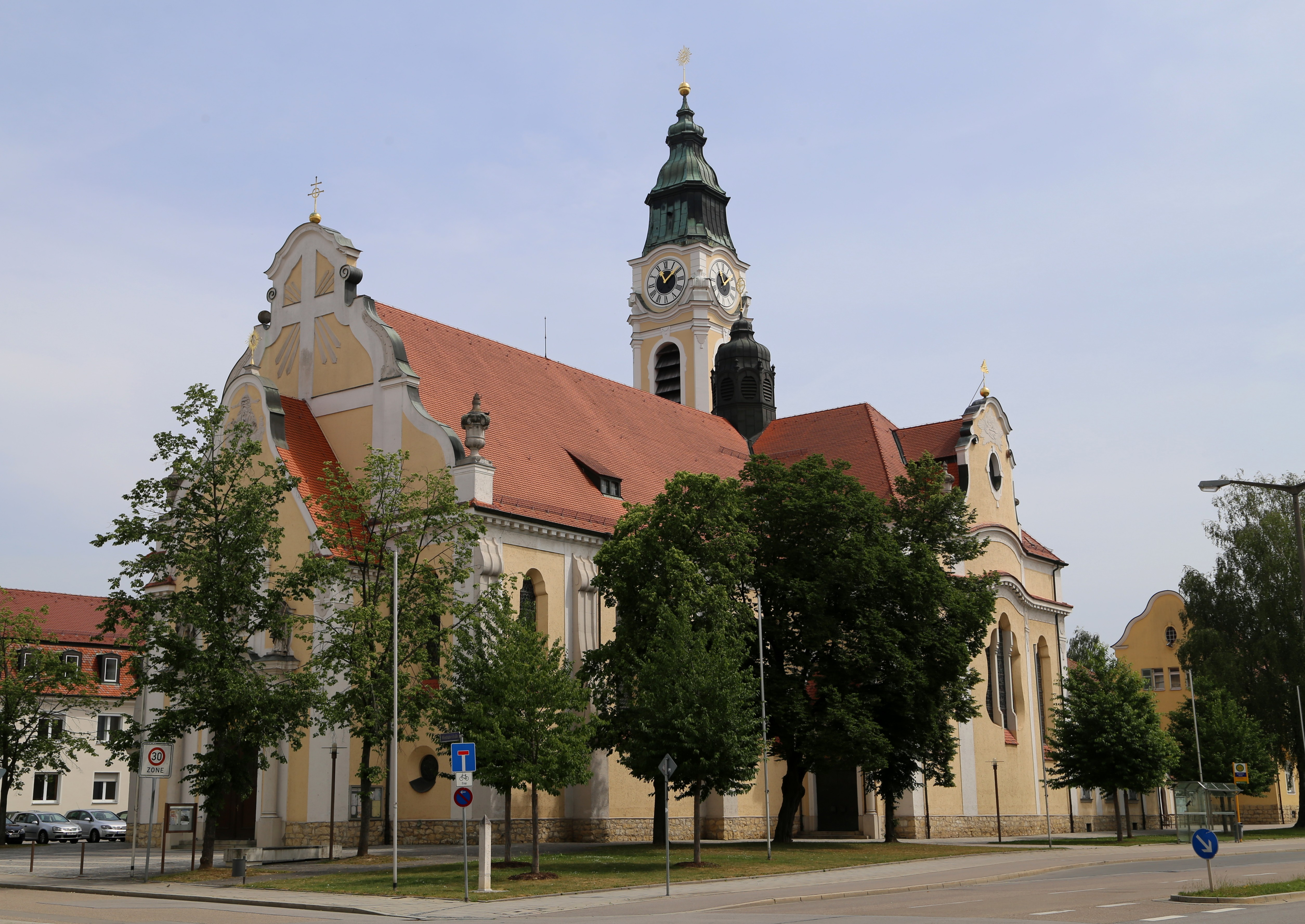 Donaustaufer Straße 29, Regensburg; Katholische Stadtpfarrkirche St. Josef, Saalbau mit Querhaus und eingezogenem Chor, Chorflankenturm mit Haubendach, Schweifgiebelfassade und Vorzeichen mit Filialgiebel, neubarock, 1906-08 von Heinrich Hauberrisser; mit Ausstattung